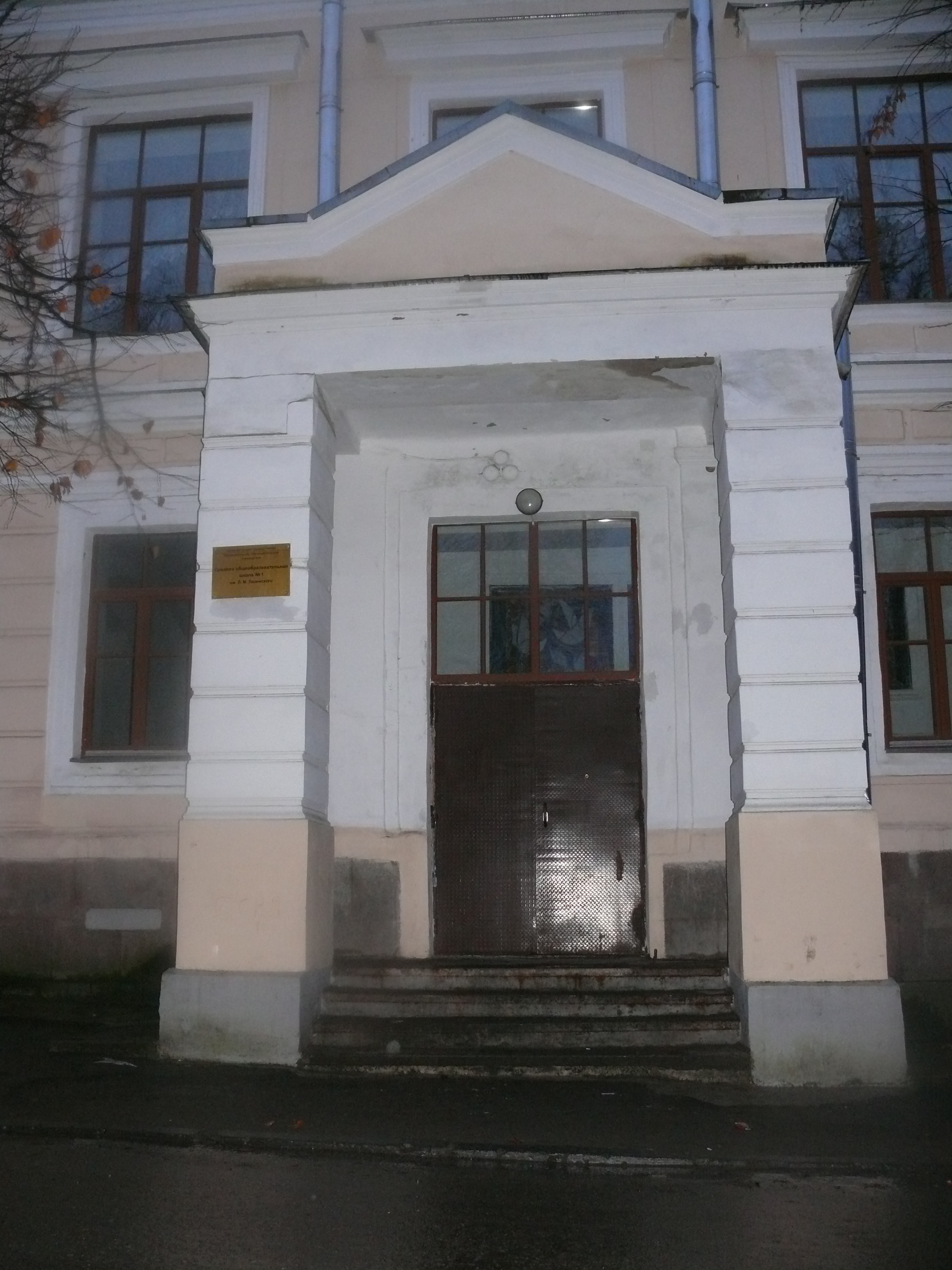 Вход в Псковскую мужскую гимназию